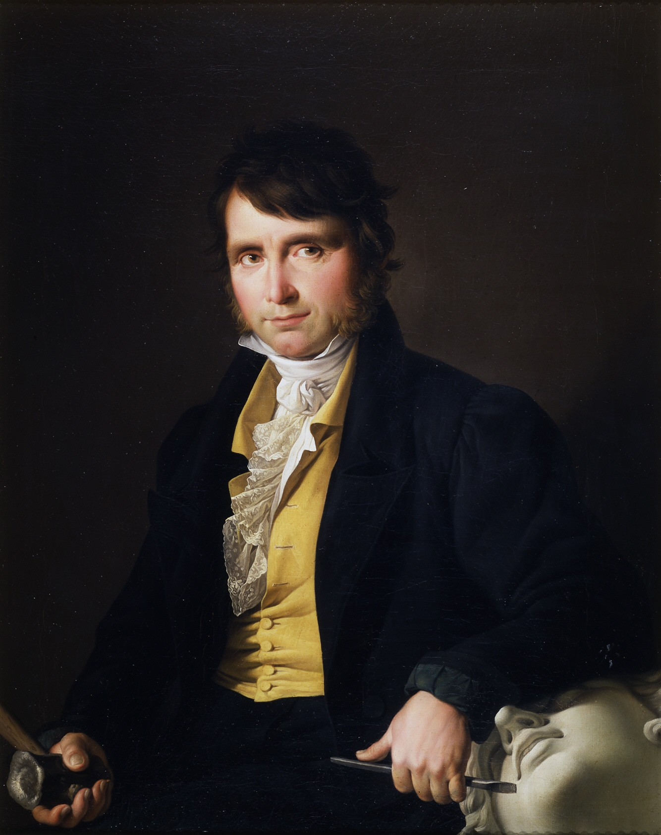 Retrato del escultor español Francisco Elías Vallejo (1783-1858).